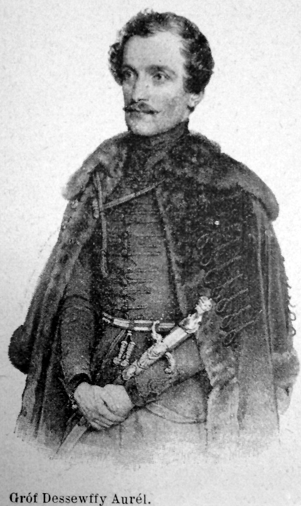 Dessewffy Aurél 1808-1842